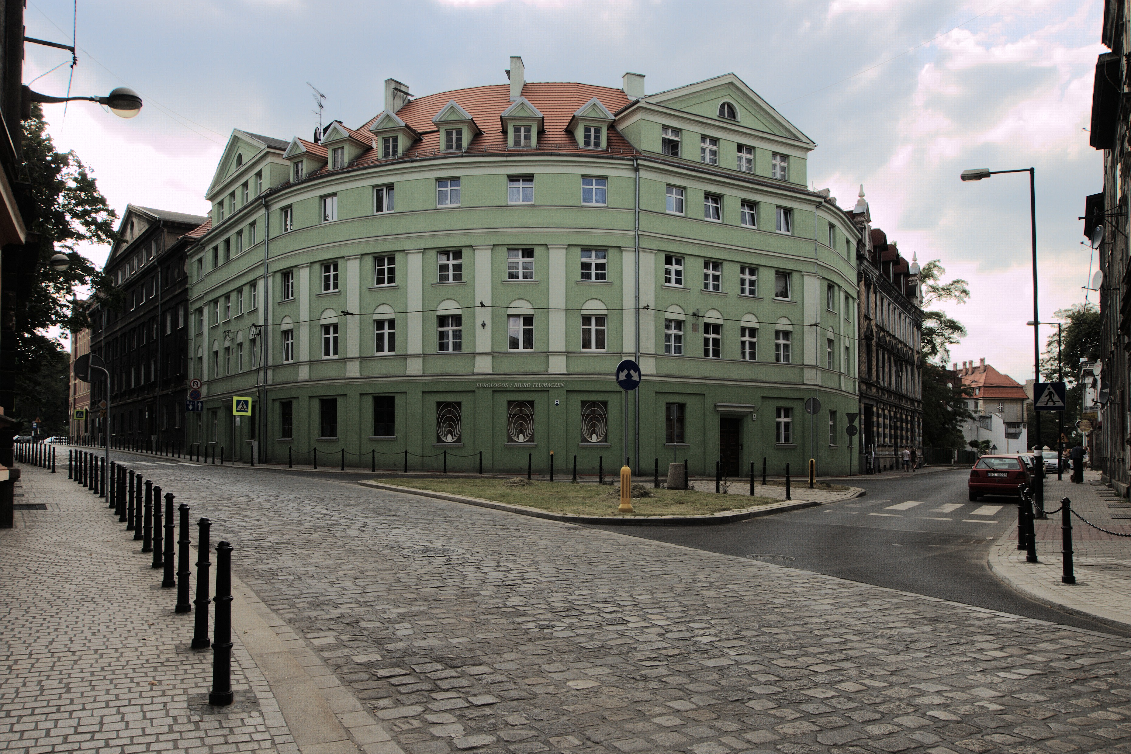 Skrzyżowanie ulic Dolnych Wałów i Młyńskiej w Gliwicach. Budynek Dolnych Wałów 22/Młyńska 1.(zabytek nr A/196/06)